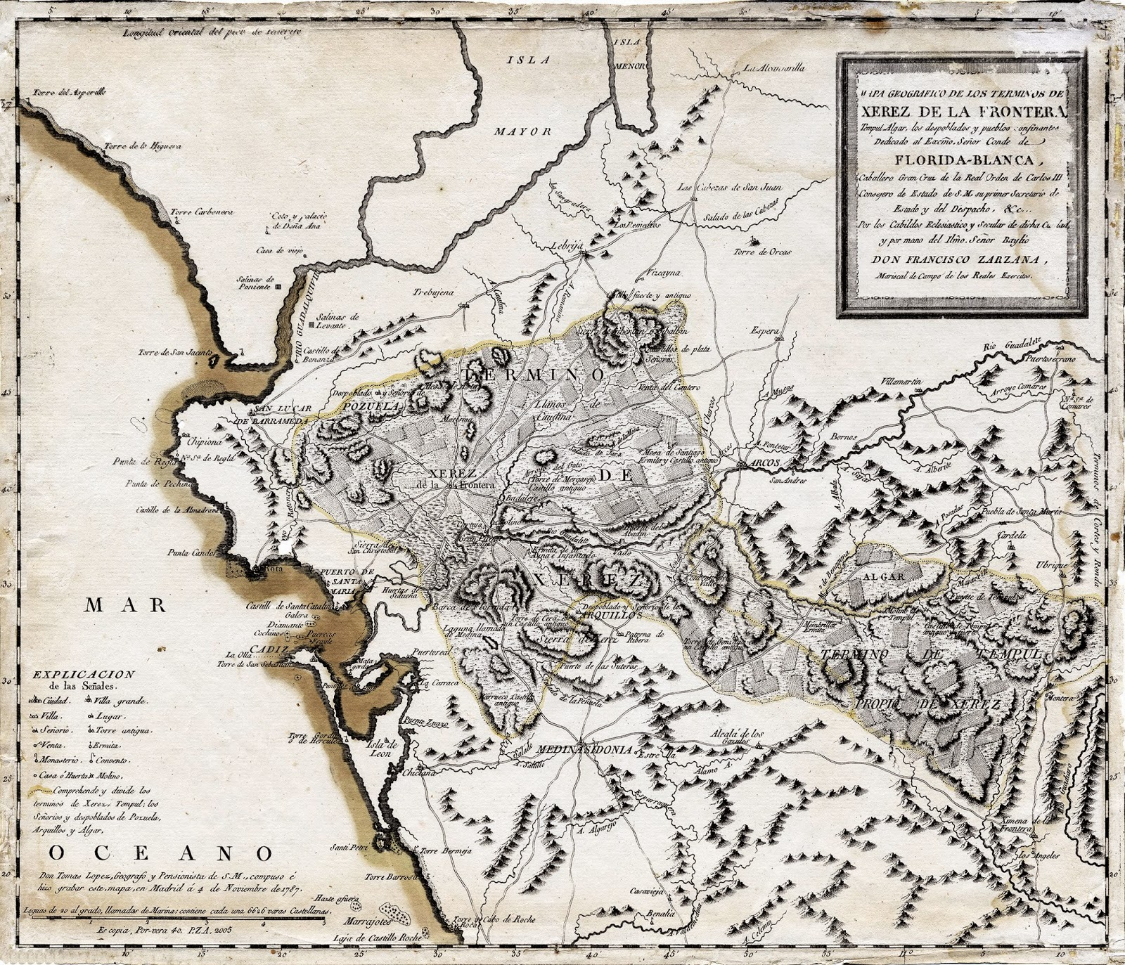 Mapa de Jerez por Francisco Zarzana en 1787